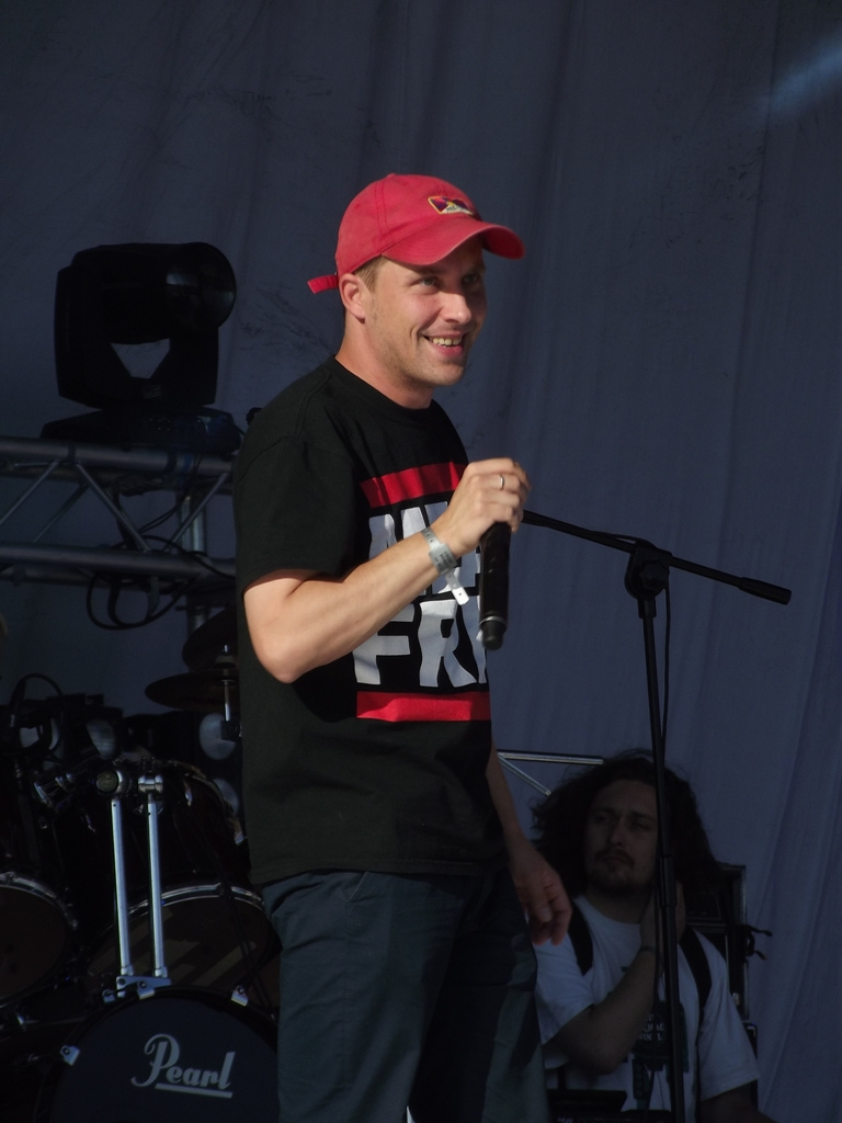 Pablopavo - zdjęcie zrobione podczas drugiego dnia Coke Live Music Festival 2011 w Krakowie.